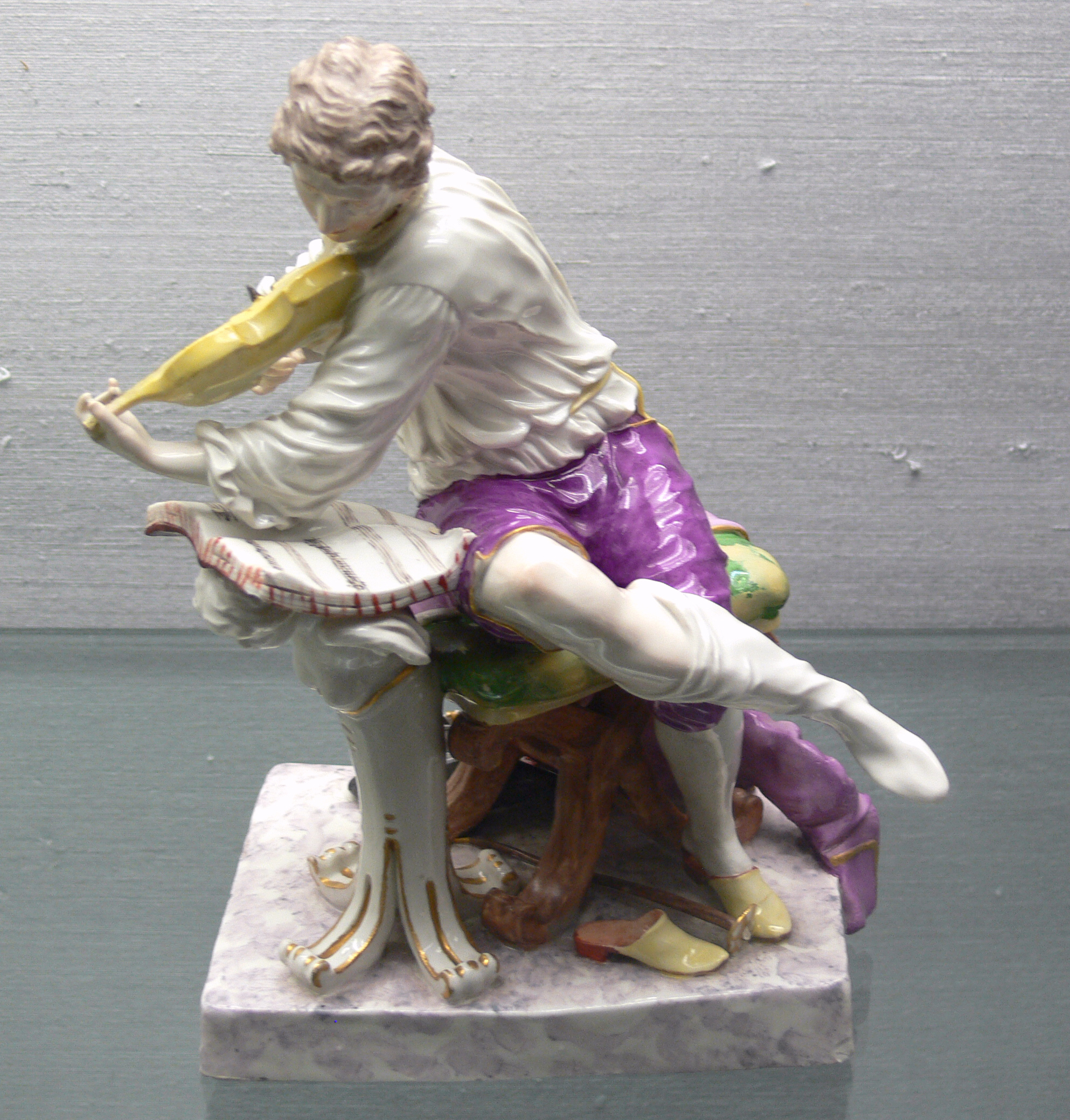 Johann Christian Wilhelm Beyer: Geigenspieler Porzellanmanufaktur Ludwigsburg, um 1765–1770 Kunstgewerbemuseum Berlin, Inv. HF 499